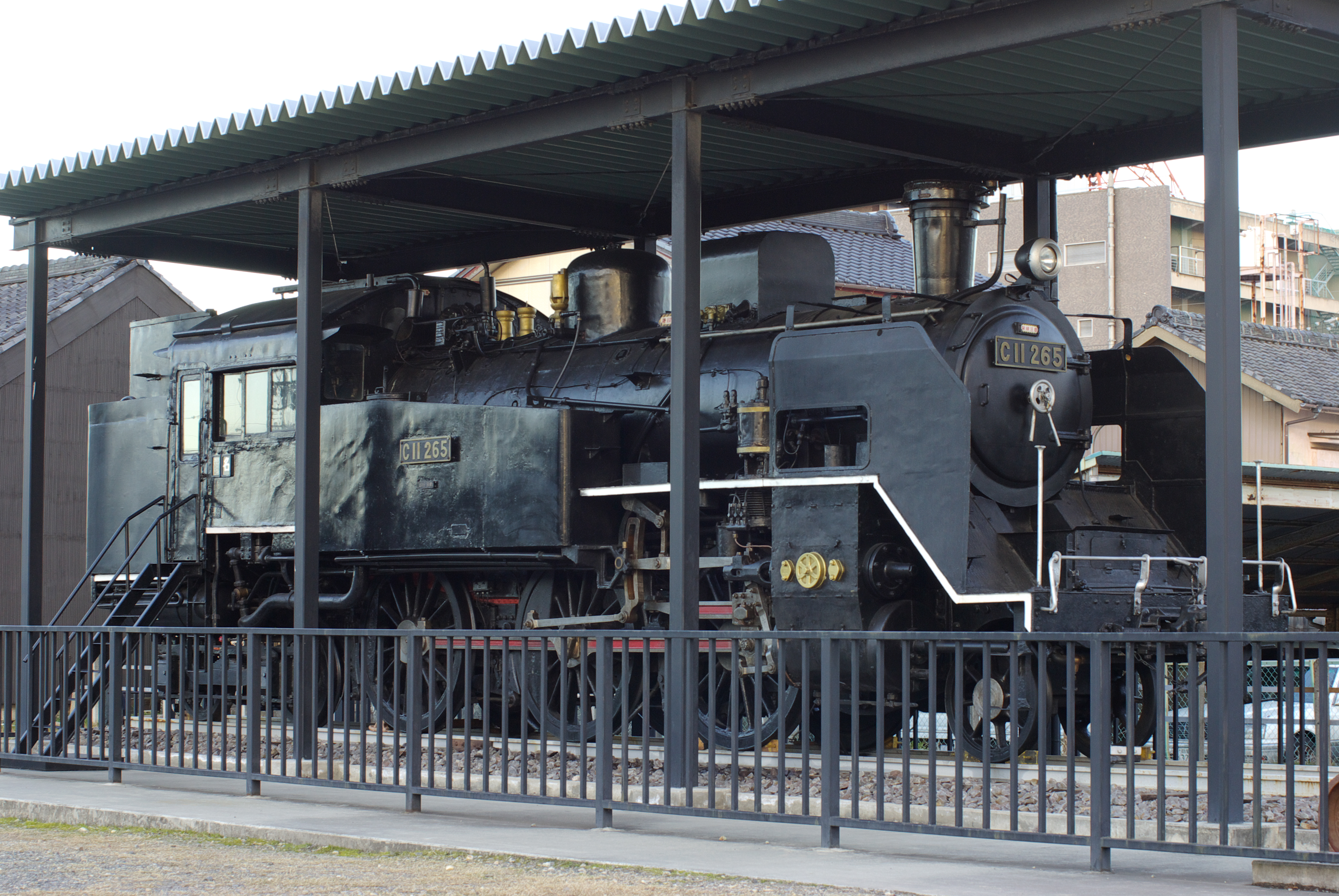 半田市鉄道資料館に静態保存されるC11 265